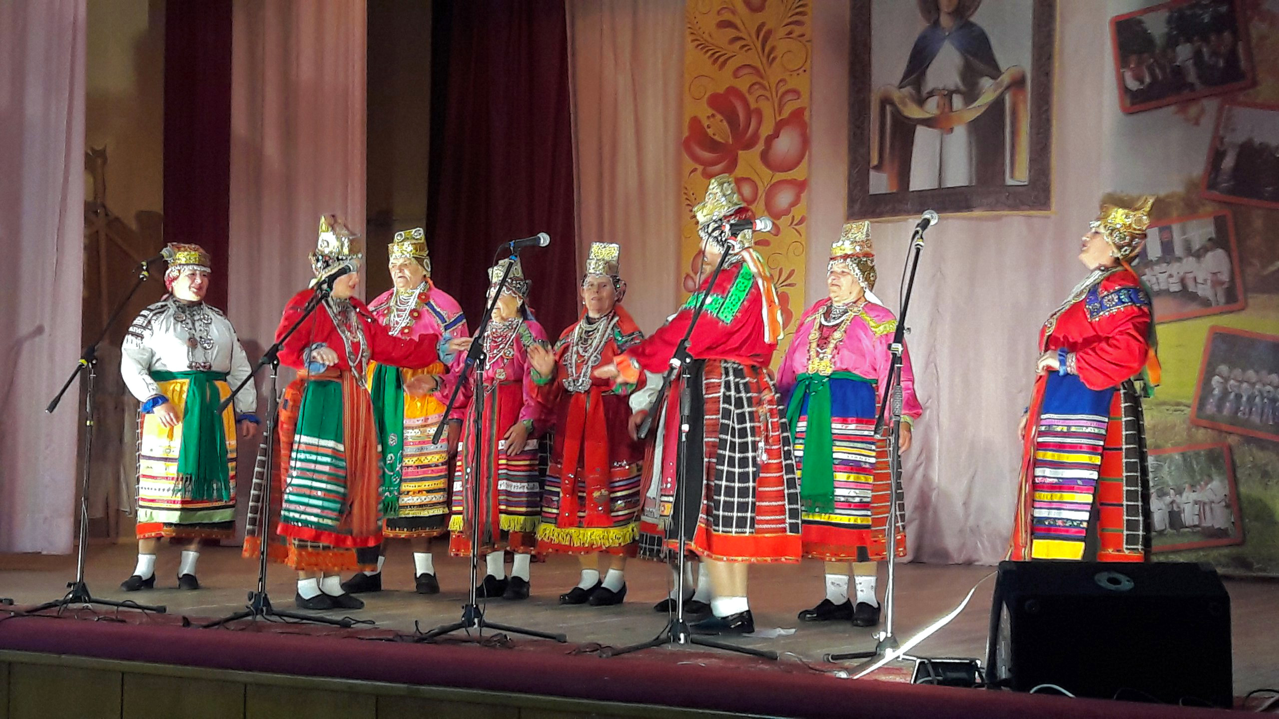 Народный самобытный фольклорный ансамбль "Сударушка", руководитель, Алла Александровна Татаринцева. Село Боровое, Новооскольского района. Престольный праздник в селе Тростенец Новоосколького района.